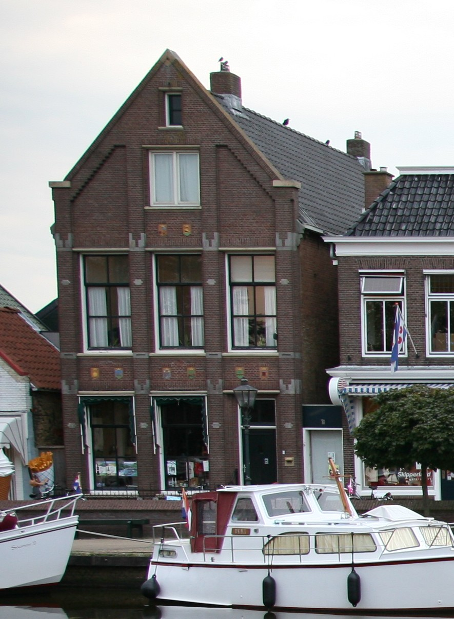 Kortestreek 11-3